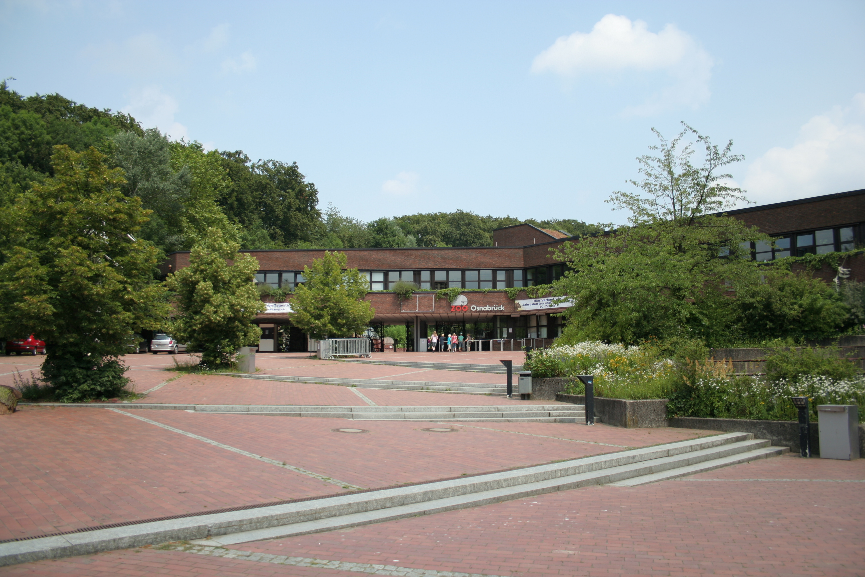 Osnabrücker Zoo. Eingangsgebäude